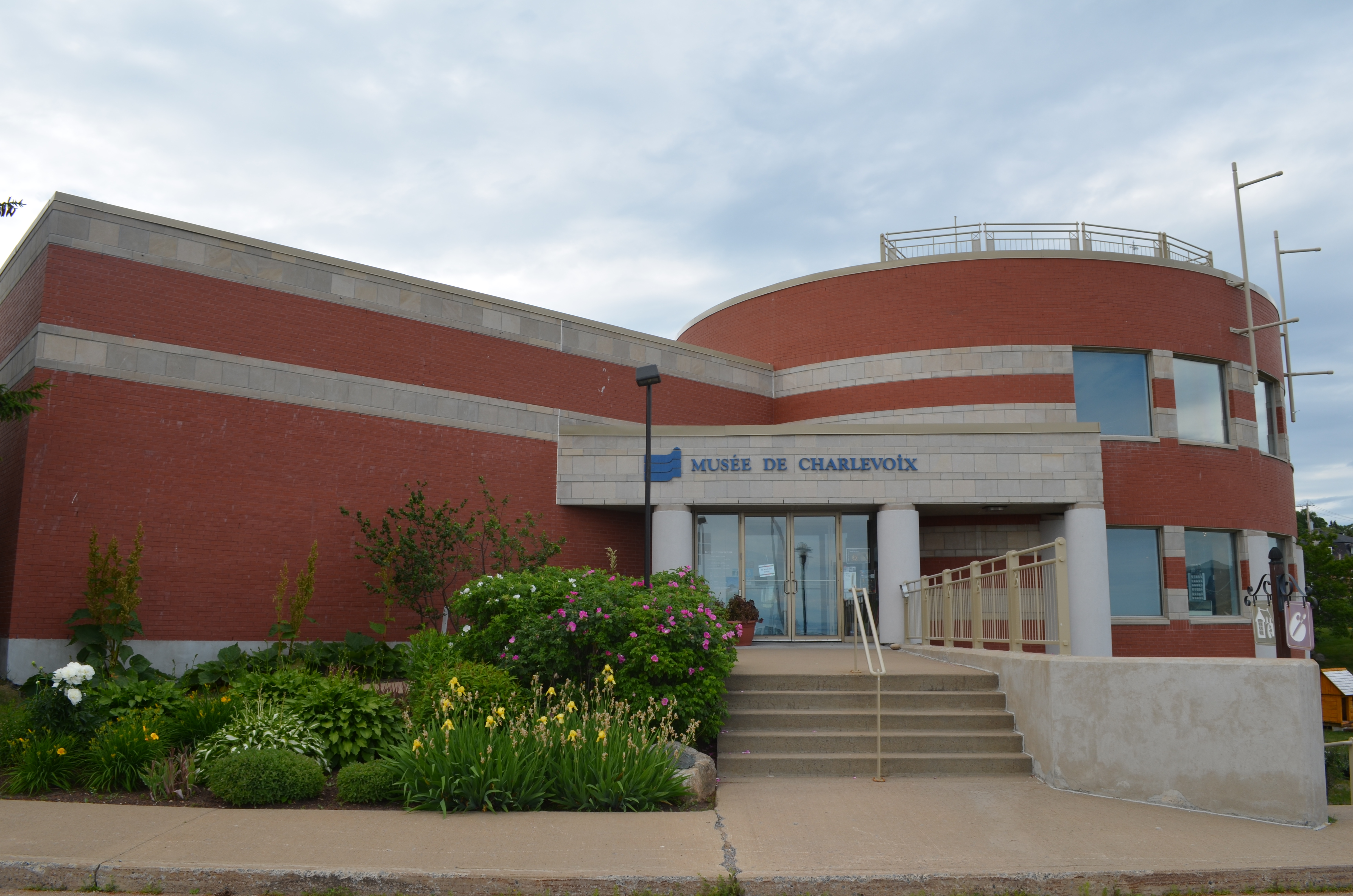 Entrée du musée de Charlevoix